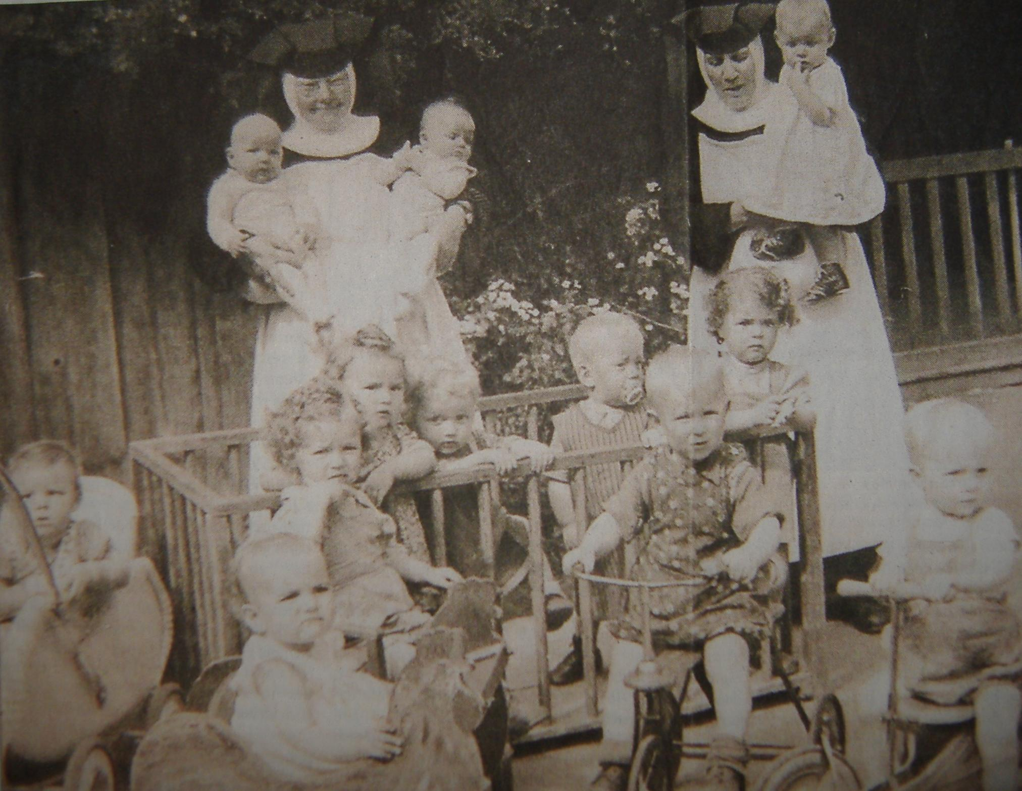 Seminarkindergarten der DillingeFranziskanerinnen